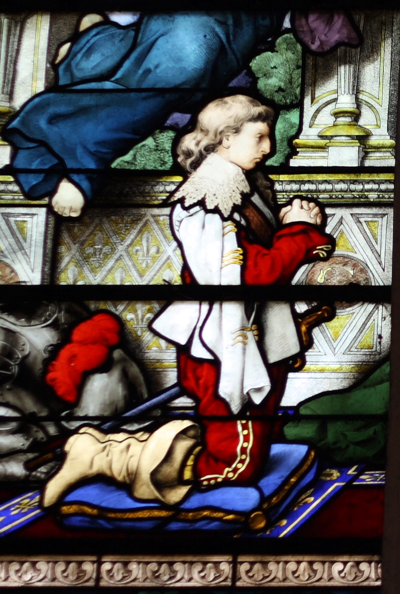 Ausschnitt eines Bleiglasfensters (19. Jahrhundert) in der katholischen Pfarrkirche Saint-Martin (Collégiale Saint-Martin) in Montmorency, Darstellung: Louis II. de Bourbon